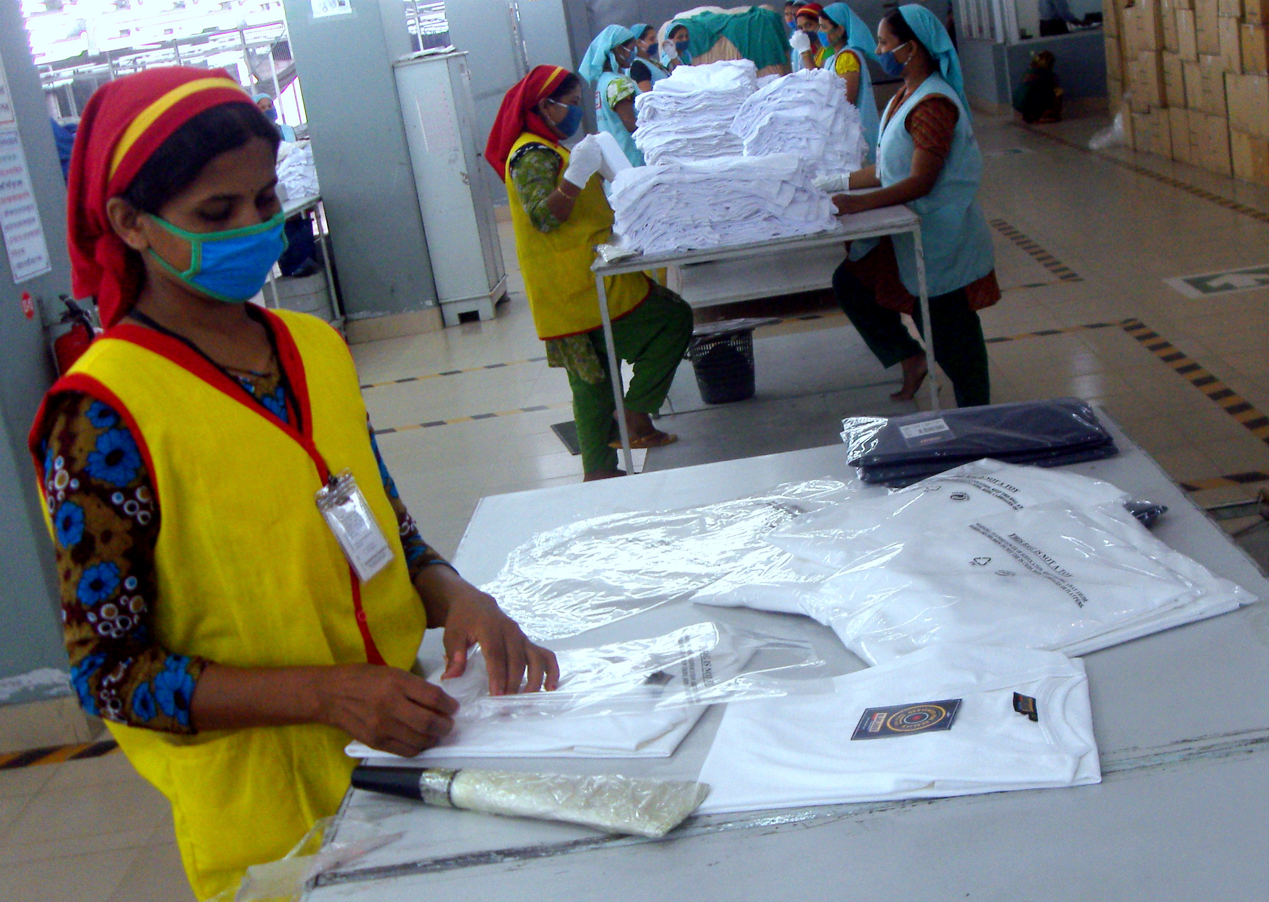 T-Shirt Quality Checking in a RMG factory of Bangladesh